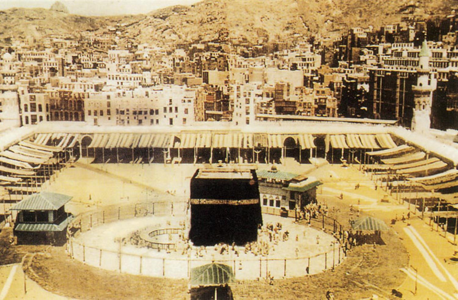 مصرى: الكعبة المشرفة المقدسة